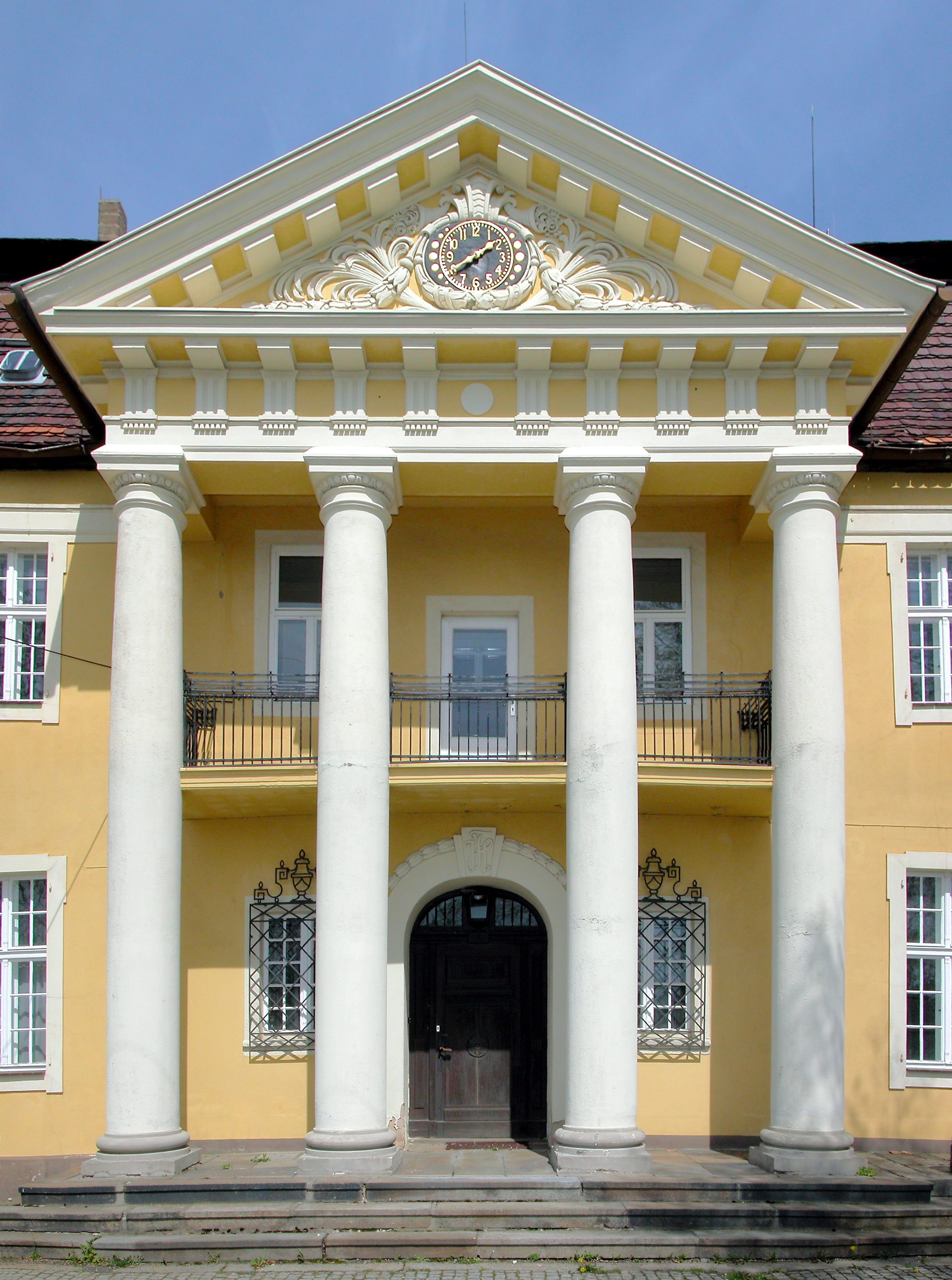 28.04.2008 02747 Niederstrahwalde (Strahwalde) Schloßweg (GMP: 51.029817,14.733179): Schloß Nieder strahwalde, erbaut im 18. Jh. unter August Leopold von Kyaw. In der DDR Kindergarten. 2002 privatisiert. [DSCN32541-32542.JPG]20080428515MDR.JPG(c)Blobelt